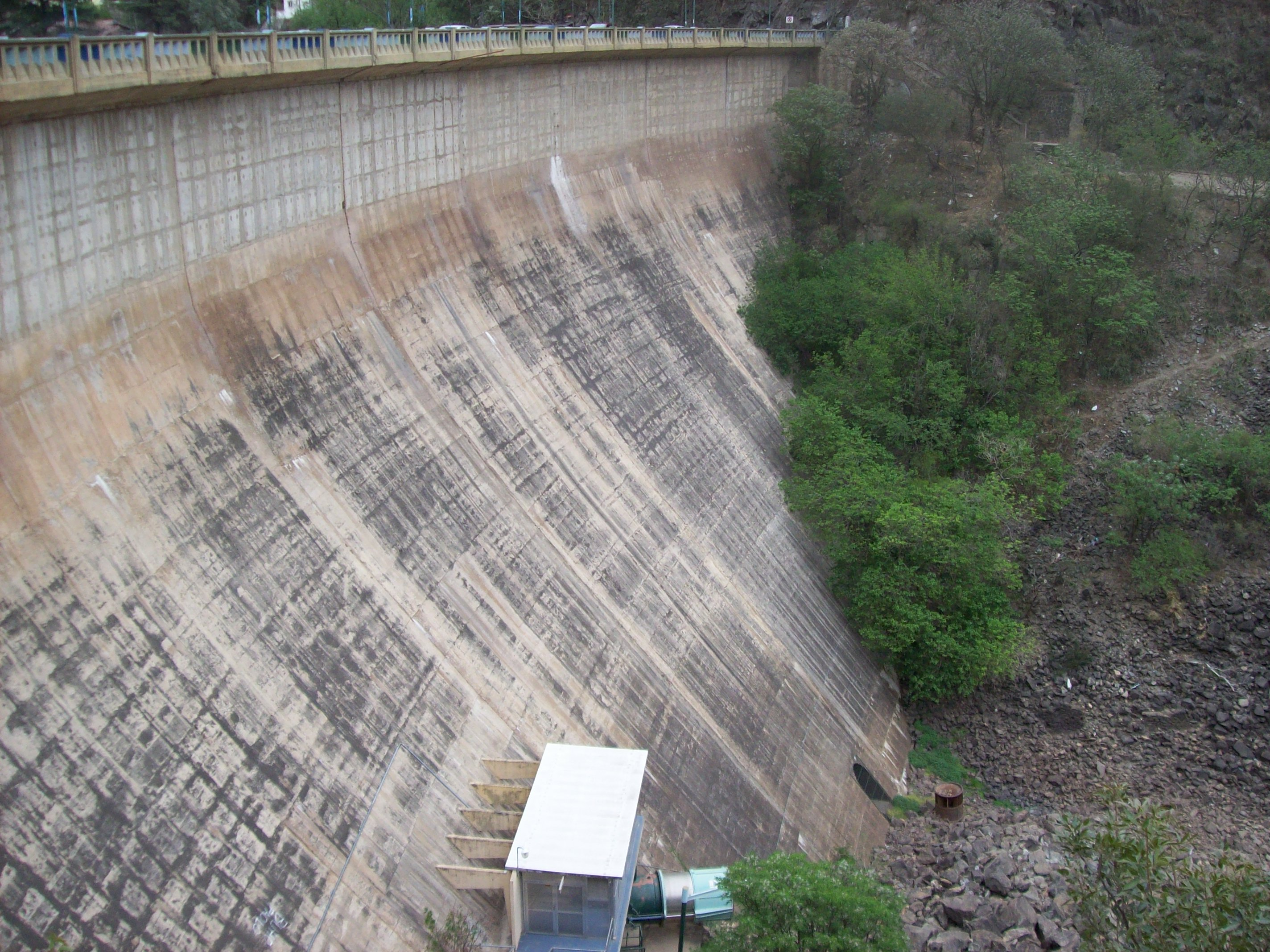 Paredón del Dique San Roque que da al Río Suquia, en la Provincia de Córdoba, Argentina.